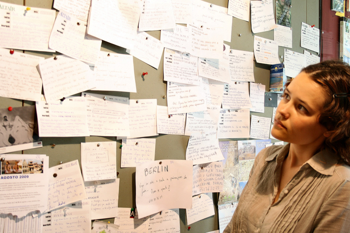 Illustration for an article published in Diario Uno. Ilustración para un artículo publicado en el Diario Uno.